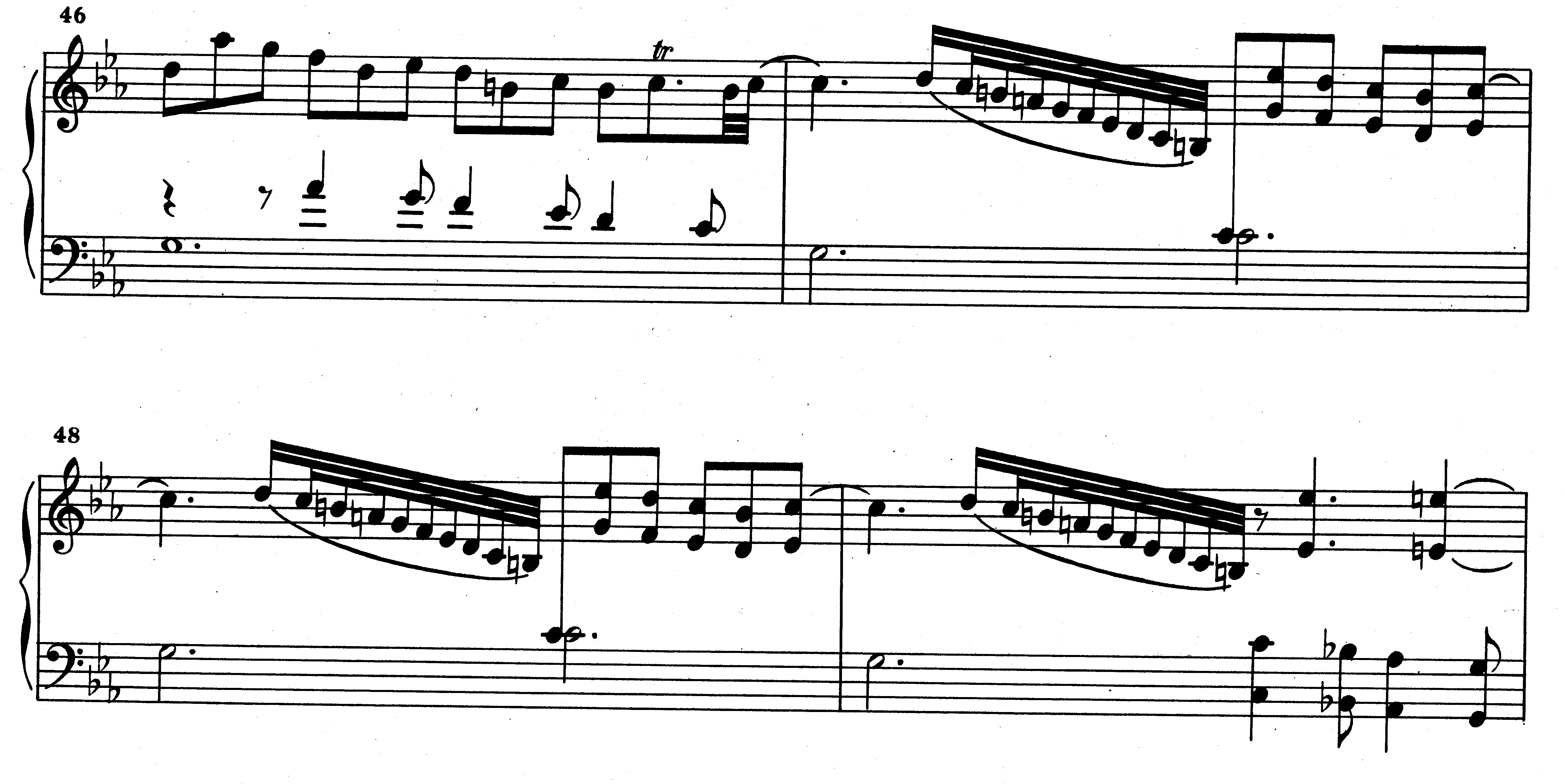 sonata domenico scarlatti K. 56 fragment